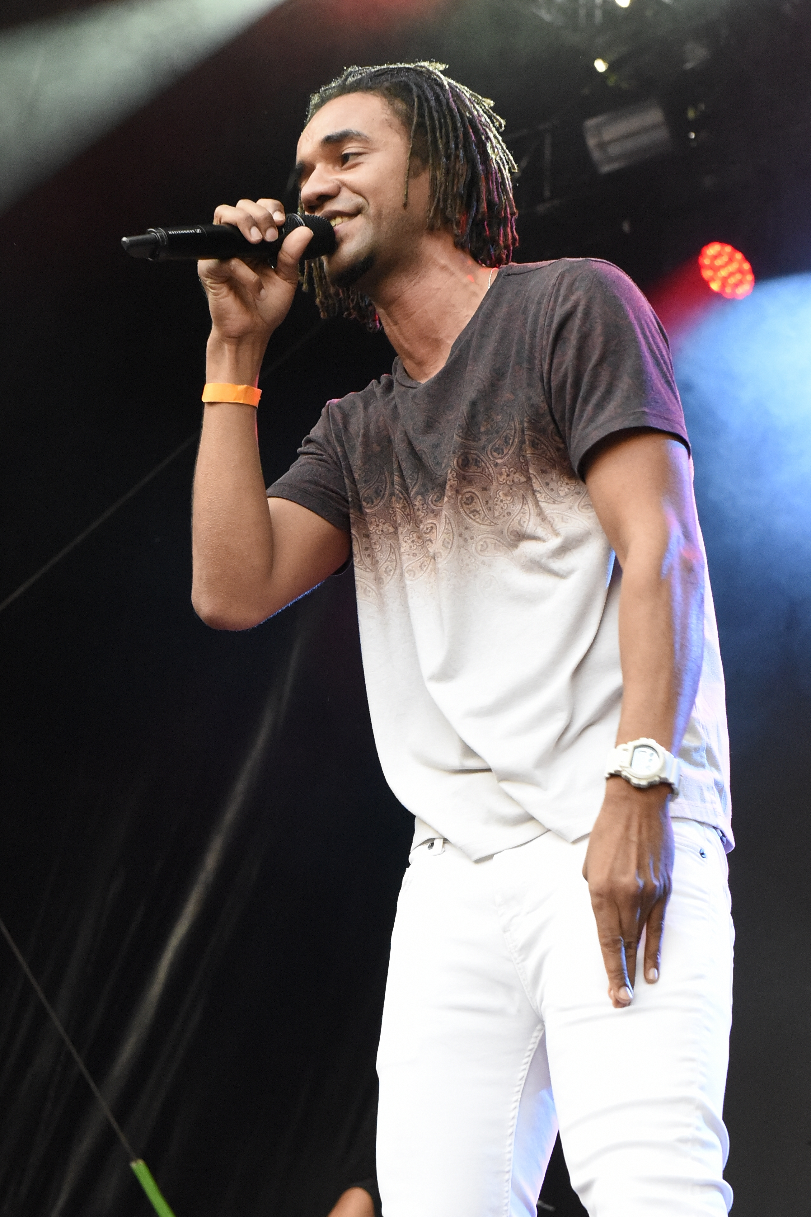 Culcha Candela bei Bochum Total 2016